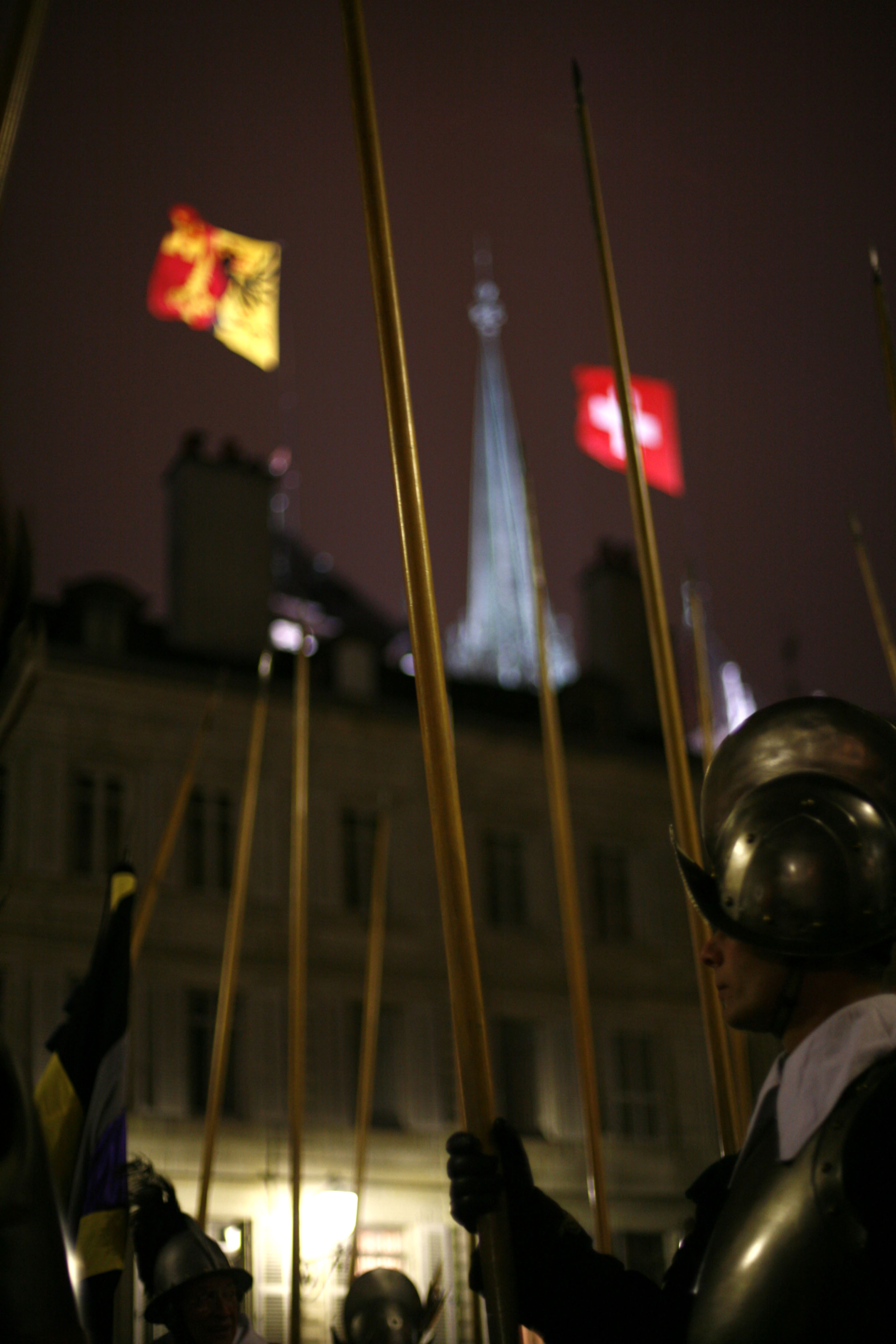 Commémoration de l'Escalade à Genève, Vieille-ville, Compagnie de 1602, le 10 décembre 2005. Photo by User:ork.ch ork(at)ork.ch Discussion Utilisateur:ork.ch (Genève) [1]